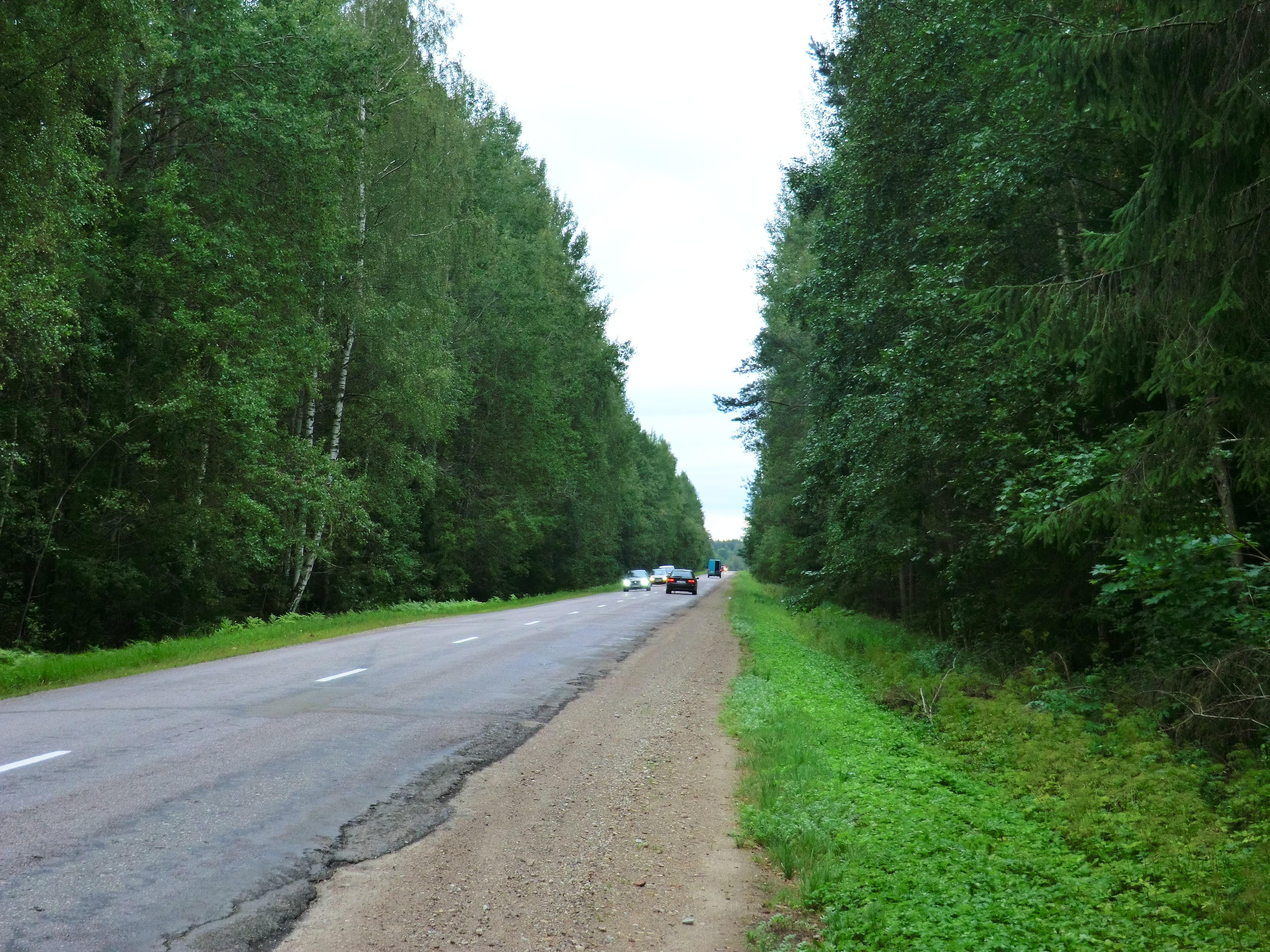 Шоссе Гулбене - Балви